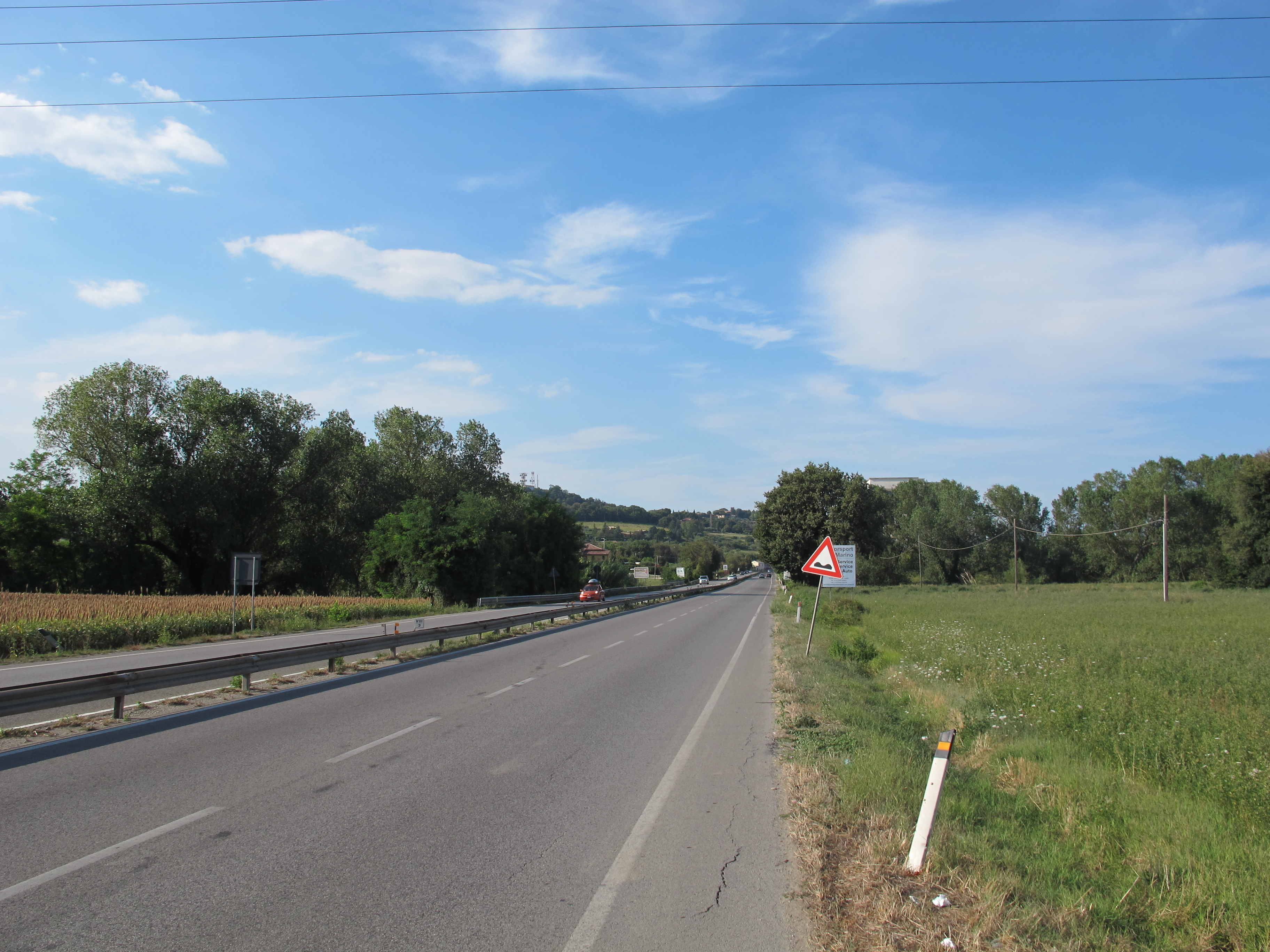 La strada statale 72 di San Marino nei pressi dell'ex pastificio Ghigi, in direzione Rimini proveniendo da San Marino.